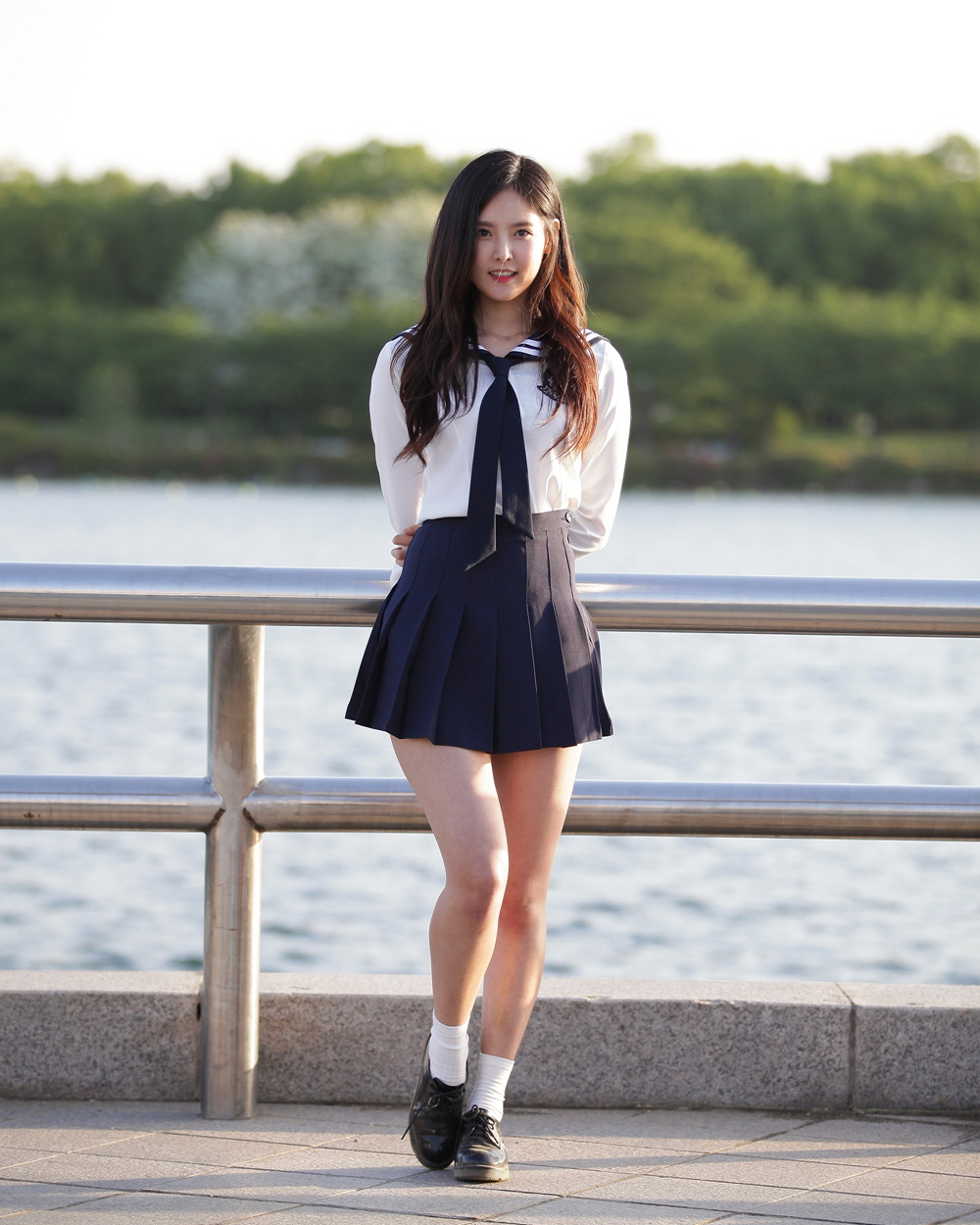 아이돌마스터.KR-꿈을 드림 (리얼걸 프로젝트(Real Girls Project) 일산 호수공원)